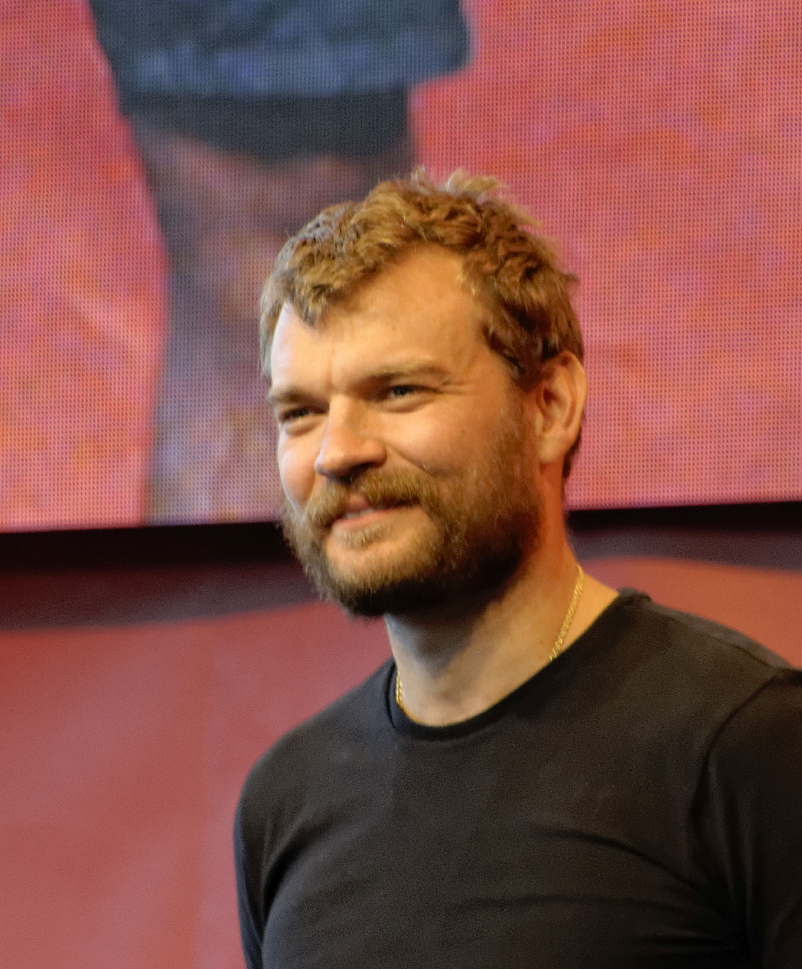 Bilder von der Comic Con Germany in Stuttgart 2018